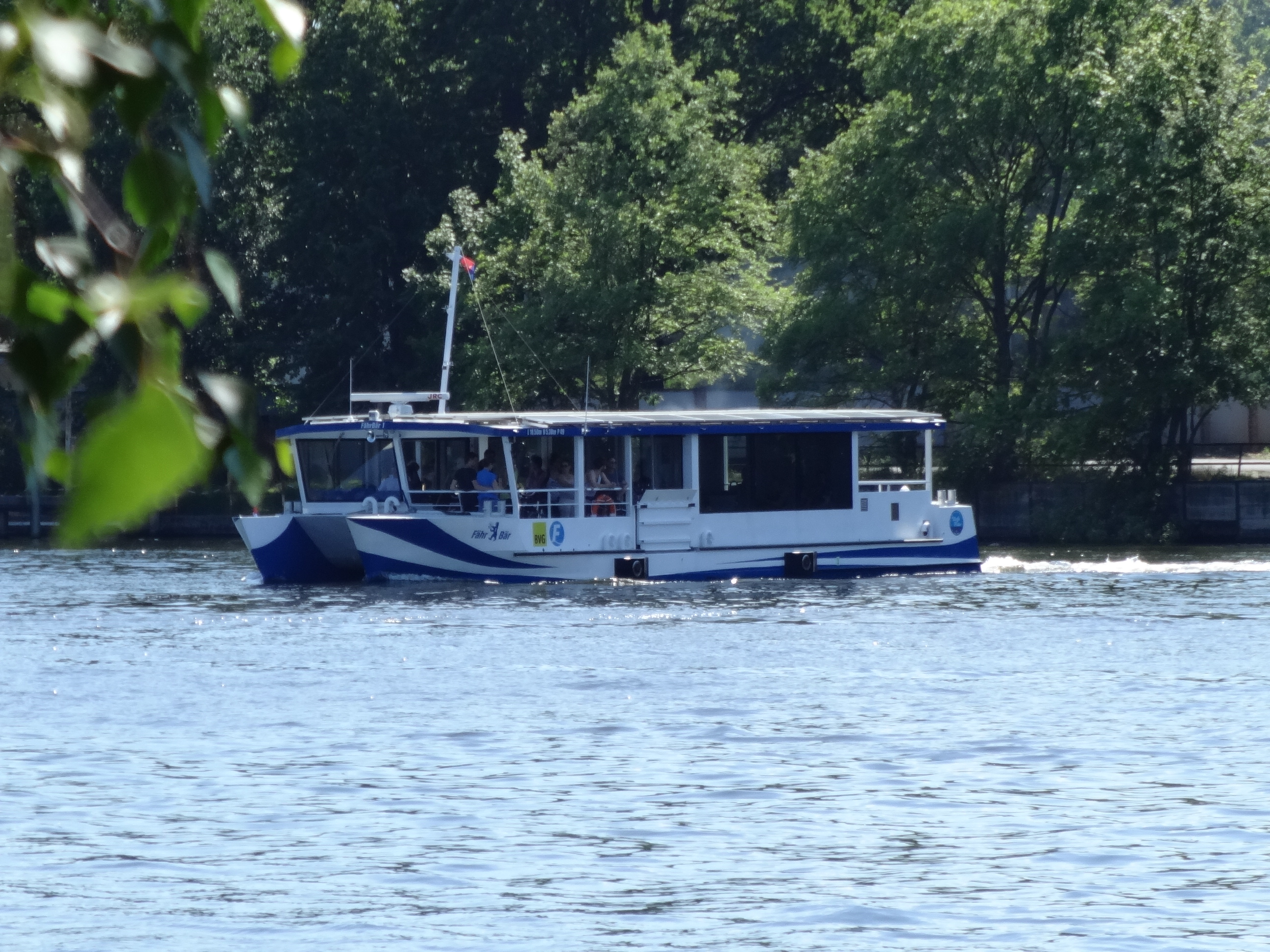 BVG-Fährlinie F11, pendelt zwischen Wilhelmstrand und Baumschulenweg über die Spree; seit 1. Januar 2014 als Solarfähre